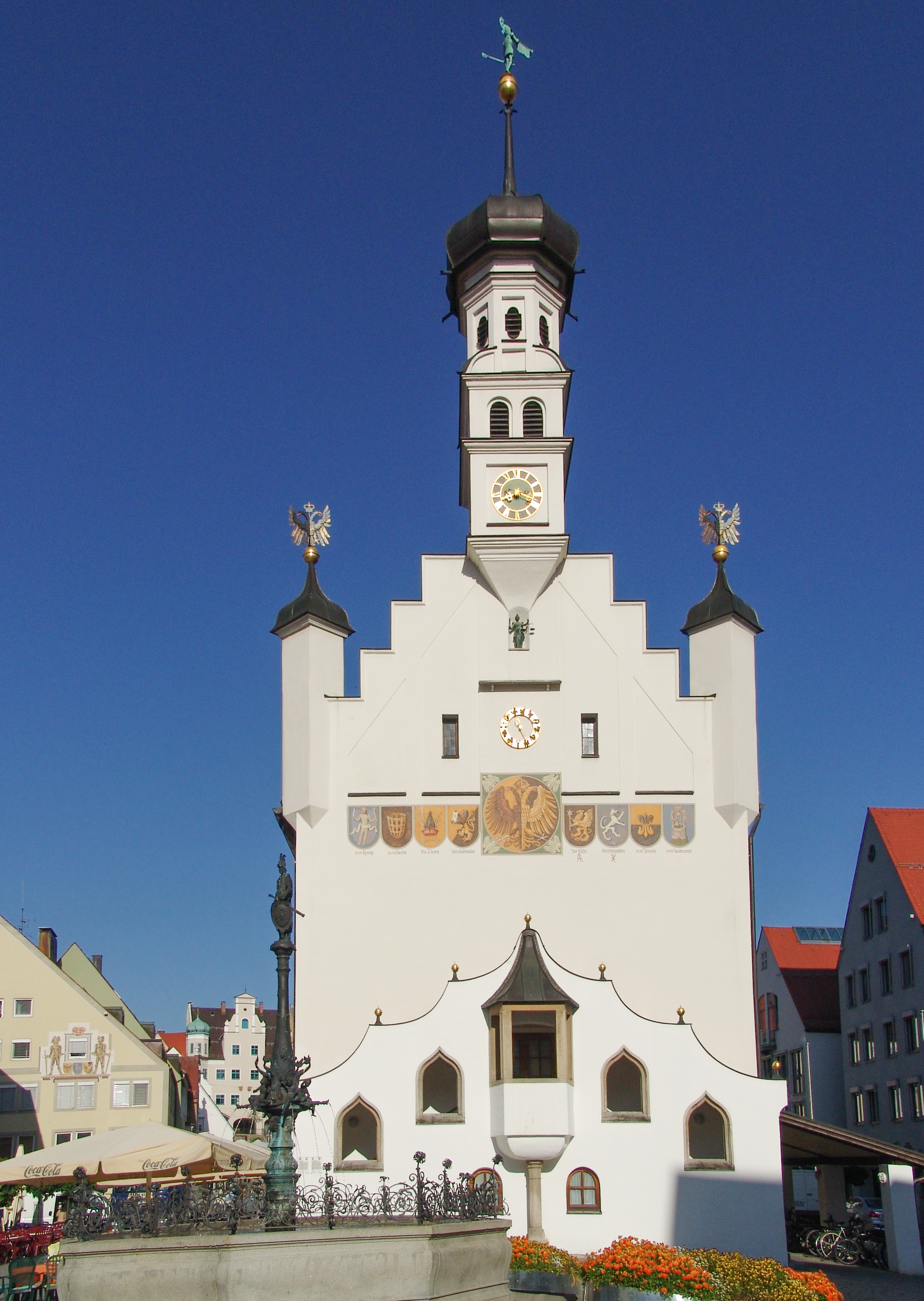 Kempten, Rathaus